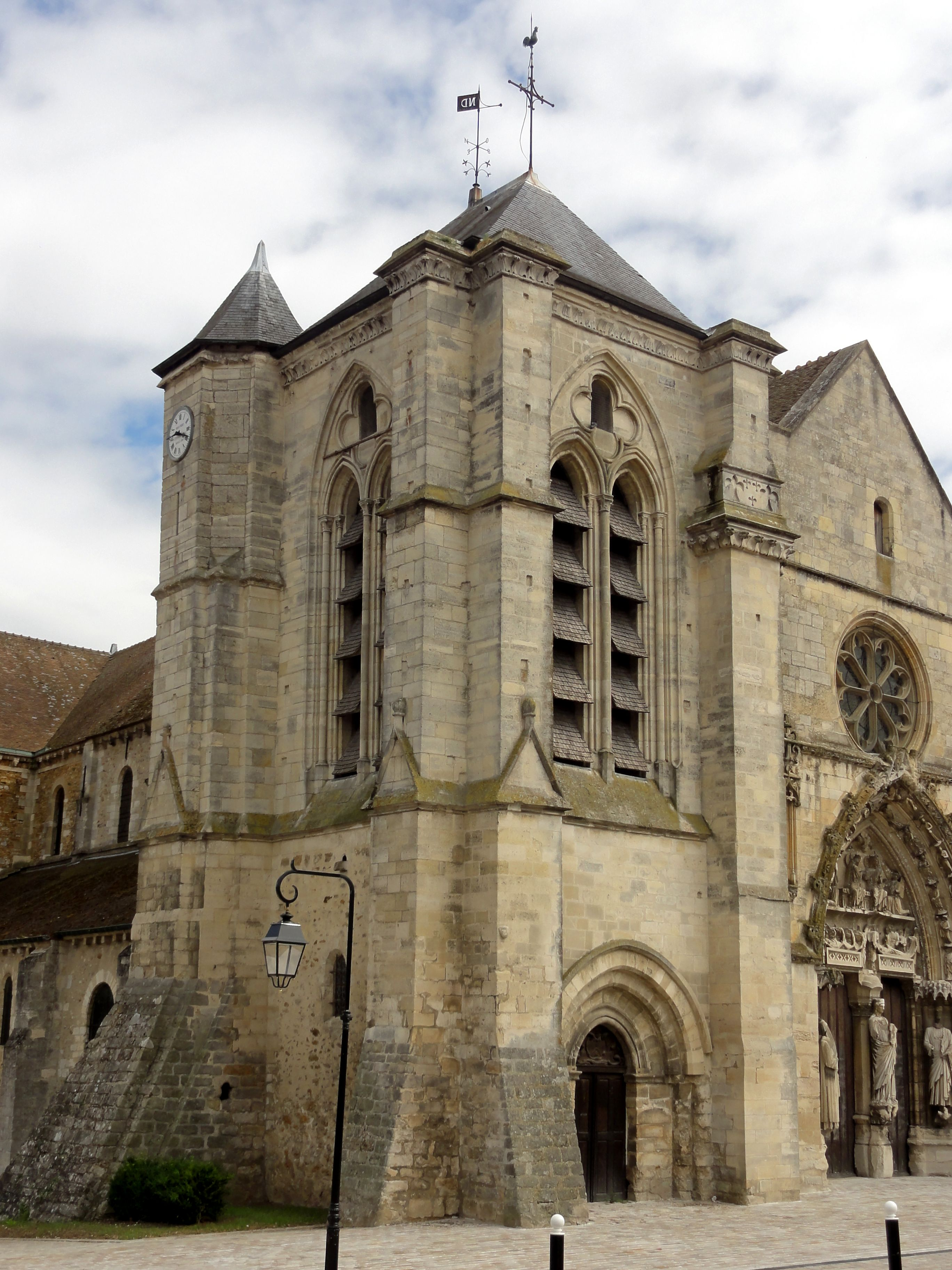 Clocher, vue depuis le nord-ouest.